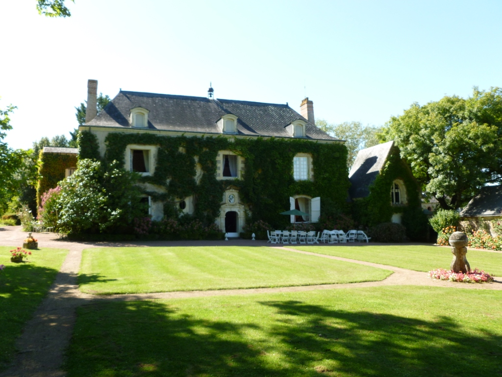 Château de la Picoulière, vue Plein Est